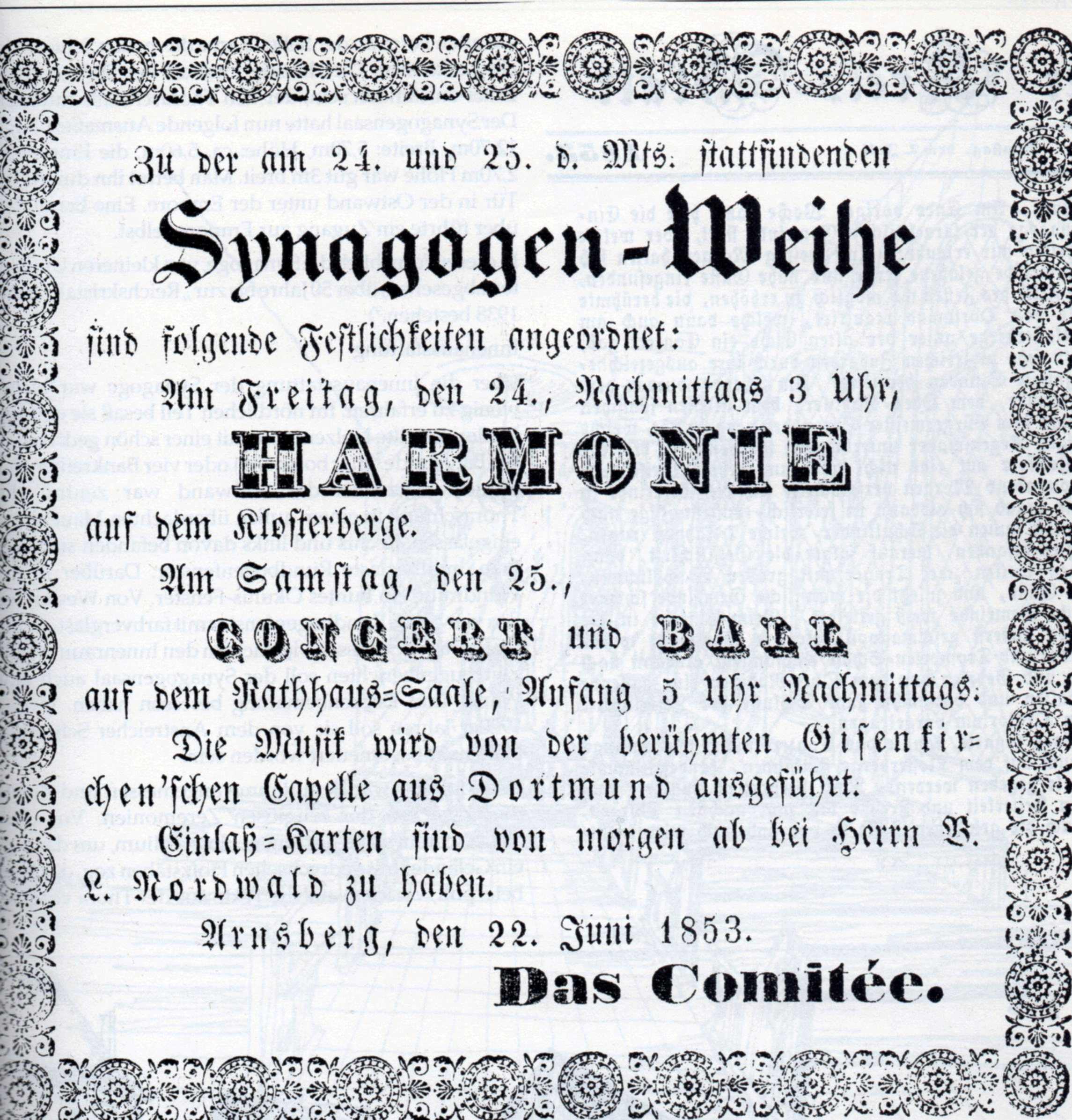 Anzeige zur Einweihung der Arnsberger Synagoge von 1853